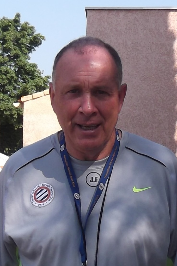 Jean Fernandez, juillet 2013.